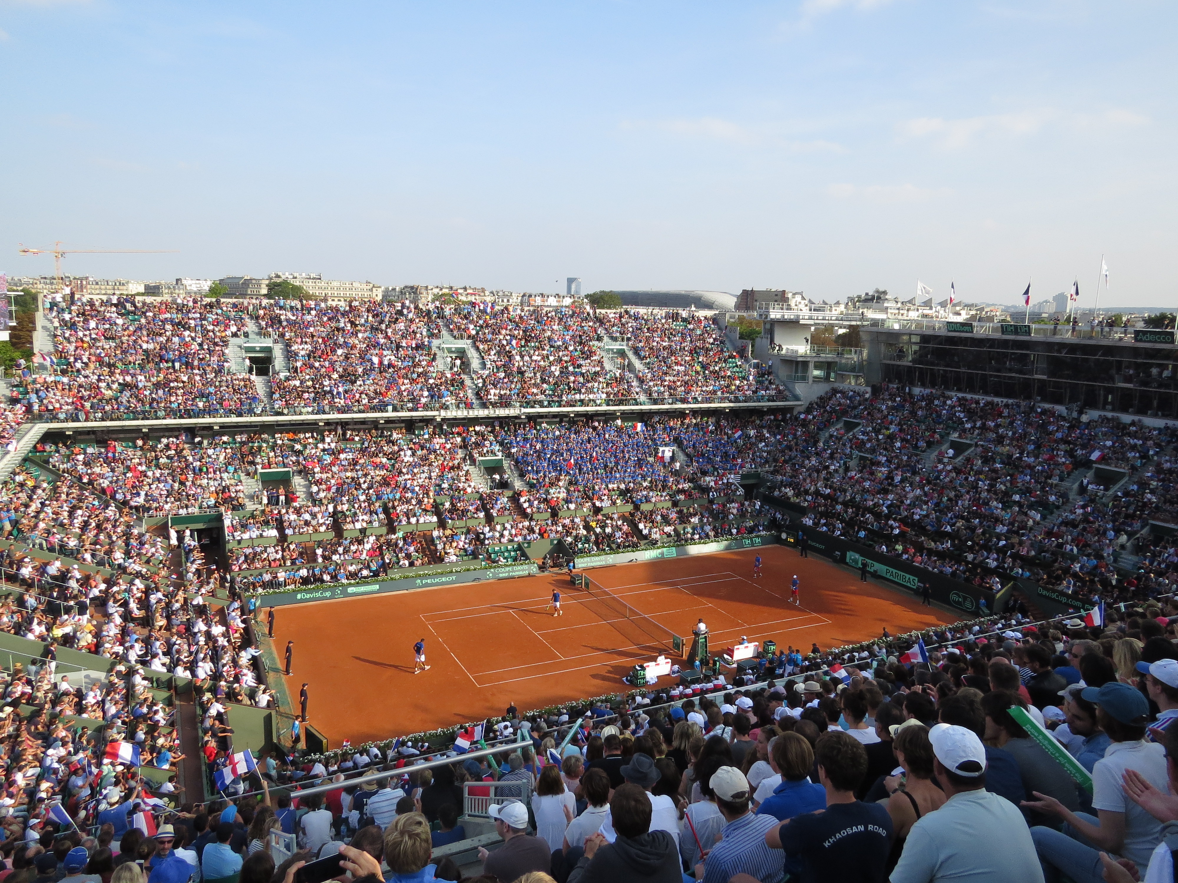 Demi-finale entre la France et la République tchèque Double Victoire de la France